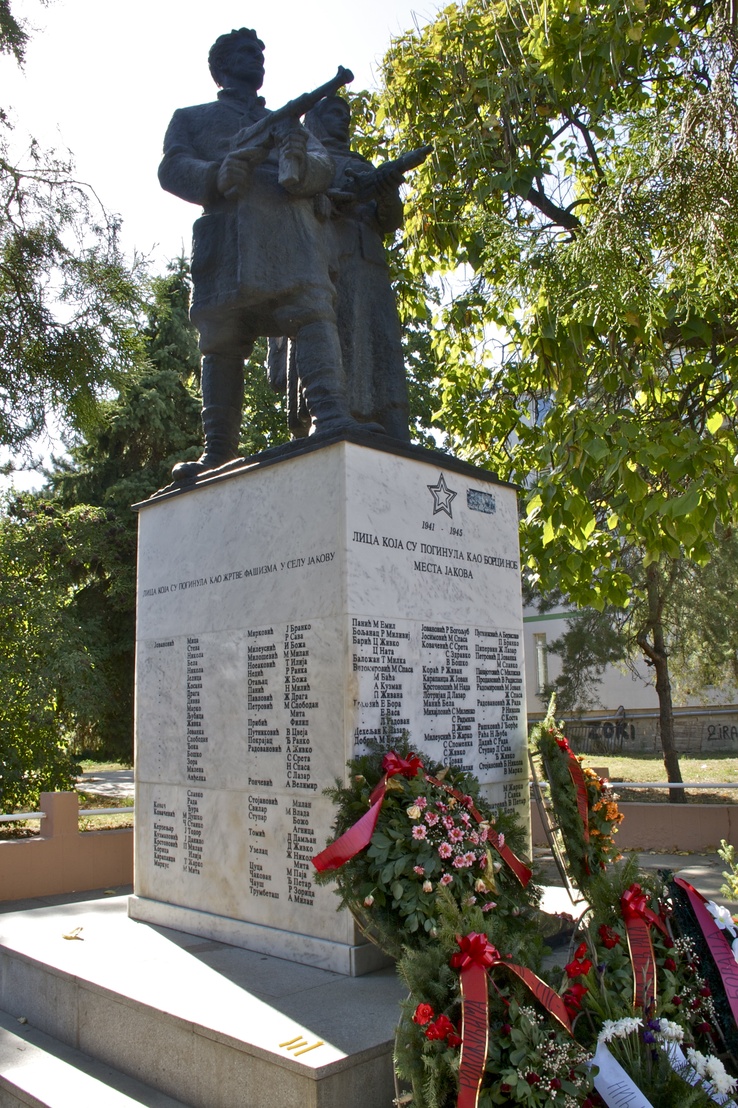 Споменик из НОБ-а Јаково, сваке године постављају се венци 7. августа у знак сећања на 20 стрељаних родољуба и мештана Јакова 1943, као одмазду за једног убијеног Немца